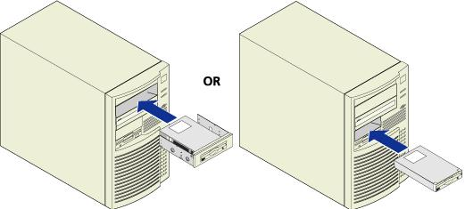 Disksürən taxçaları